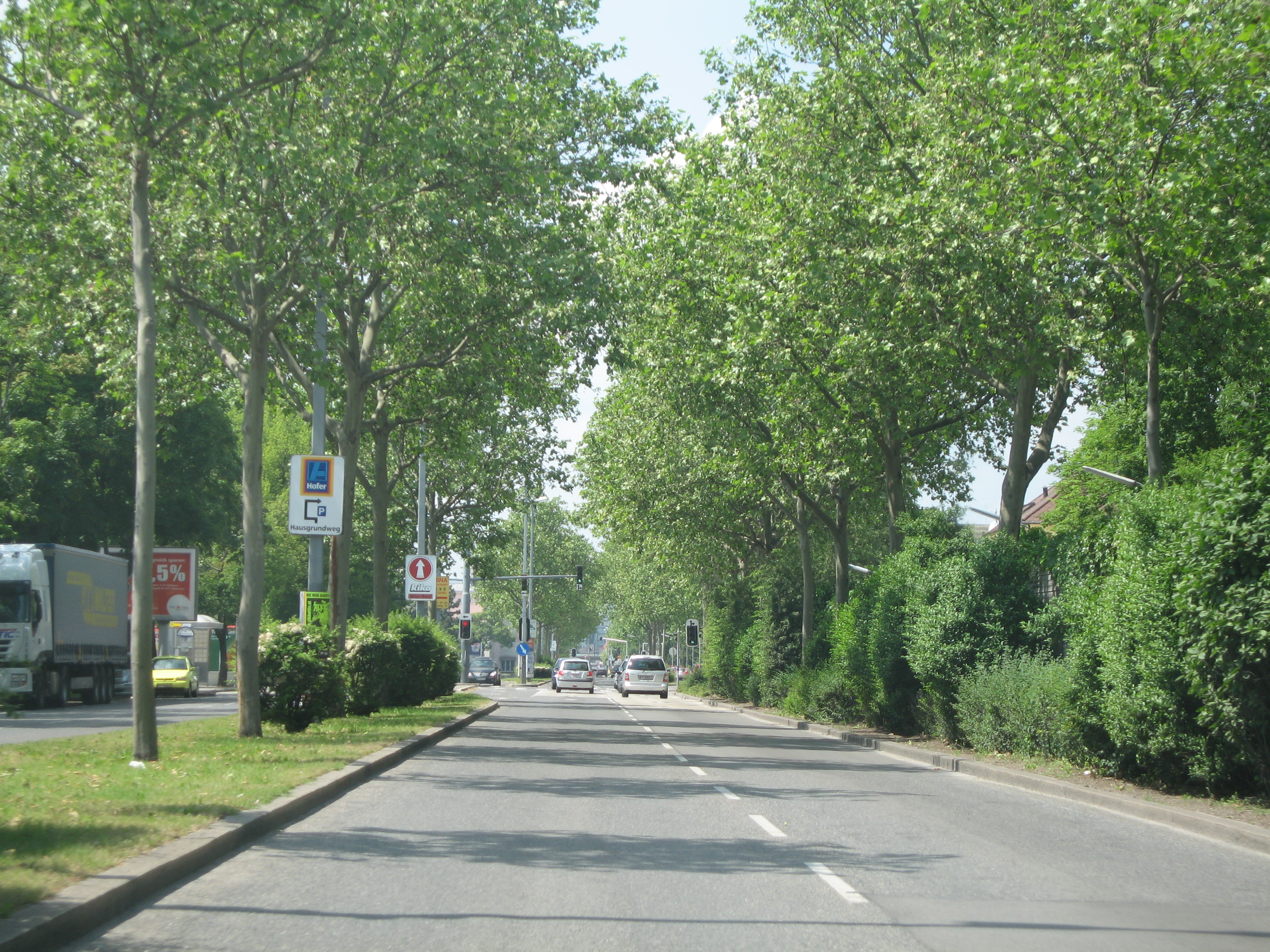 Erzherzogkarlstraße in Wien